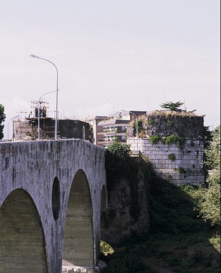 Ponte Romano e Torri di Federico II di Capua